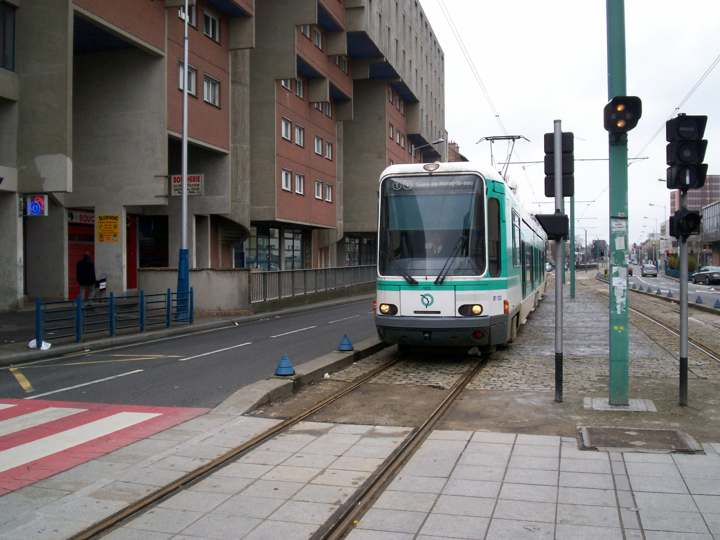 T1 à Hôtel de Ville de La Courneuve